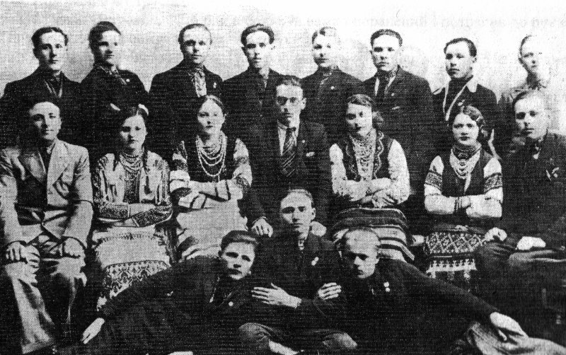 Драматичний гурток у селі Говилів Теребовлянського району, 1935